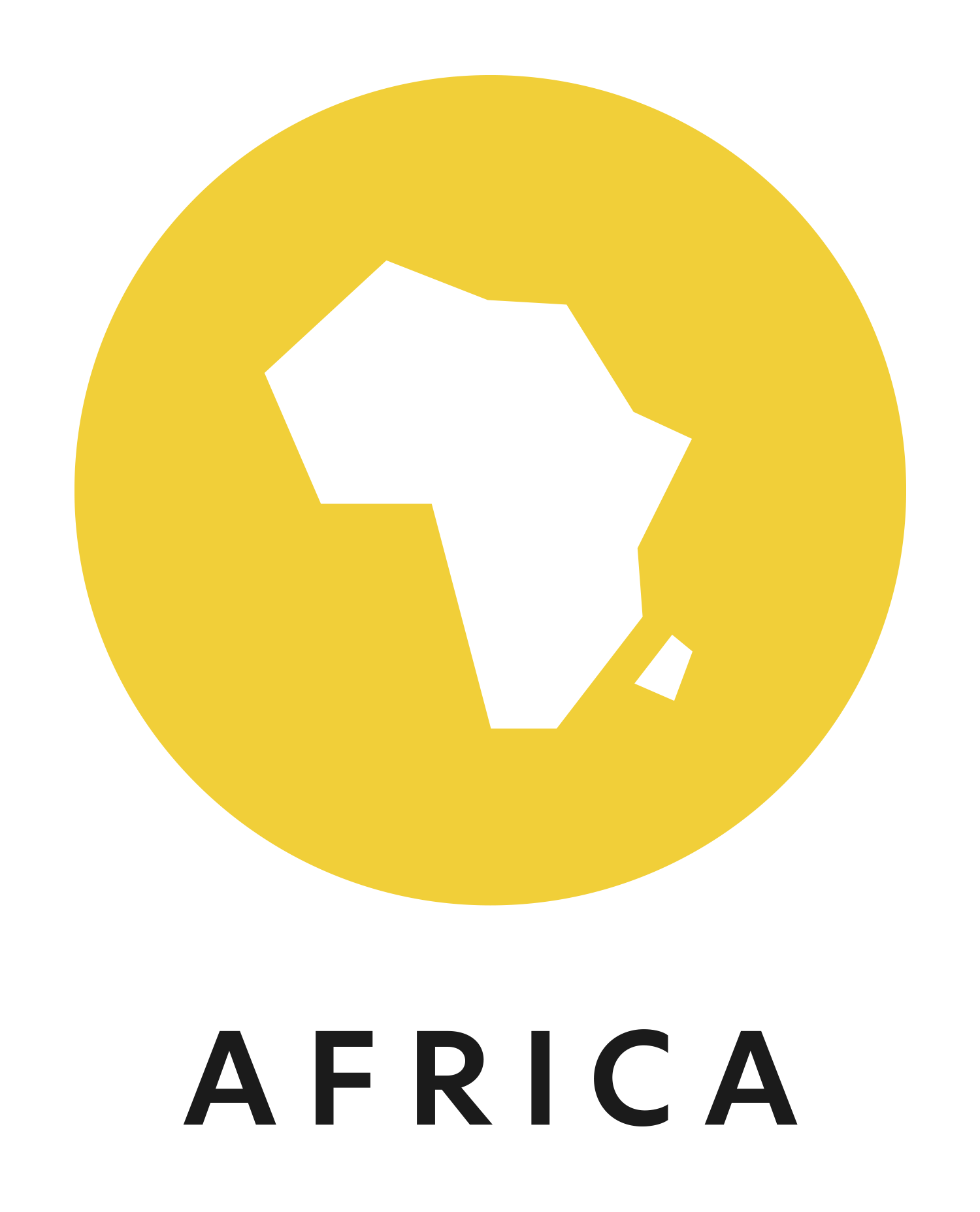 Logo da Africa em amarelo e branco.